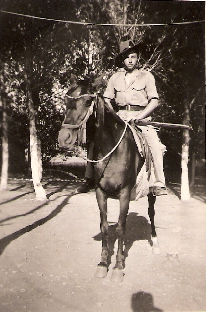 Chanan Rapaportת Psychologist from Israel חנן רפפורט, הקים בשנת 1951 ביחד עם אליקים העצני את "שורת התנדבים" היה מנהלו של מכון הנרייטה סולד ויועץ לגולדה מאיר ויצחק רבין חנן רפפורט בהגנה, כיסויו היה כנוטר במשטרת הישובים